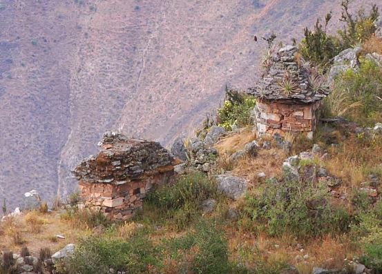 Chullpas en Marcajirca, sitio arqueológico del periodo denominado Intermedio Tardío en la provincia de Huari, Áncash - Perú. Fotograma del 21 de junio de 2013, tomado durante el Proyecto de Investigación Arqueológica y Bioarqueológica Huari-Ancash